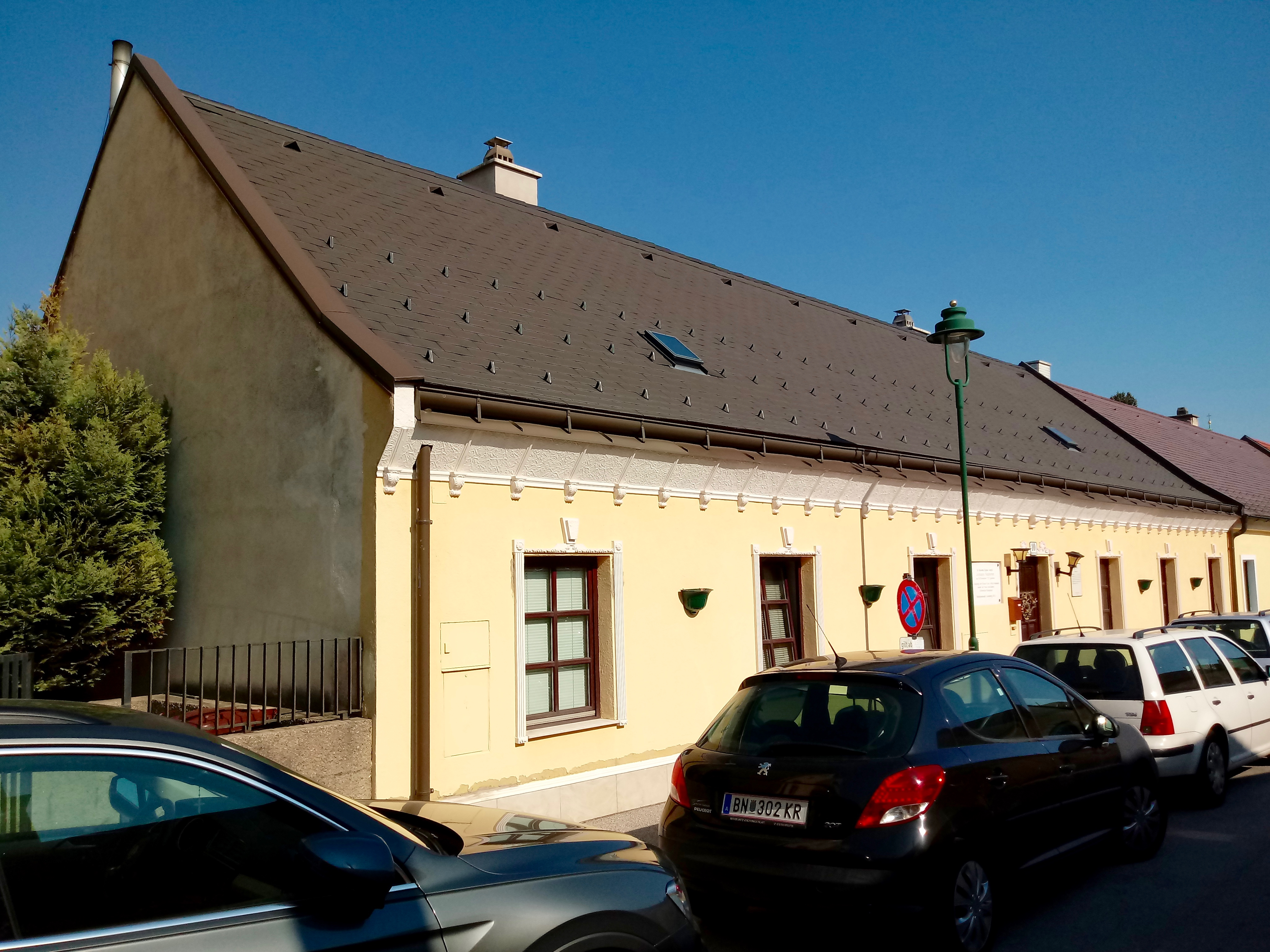 Geburtshaus von Johann Natterer. Falkeniergasse 10, Laxenburg.